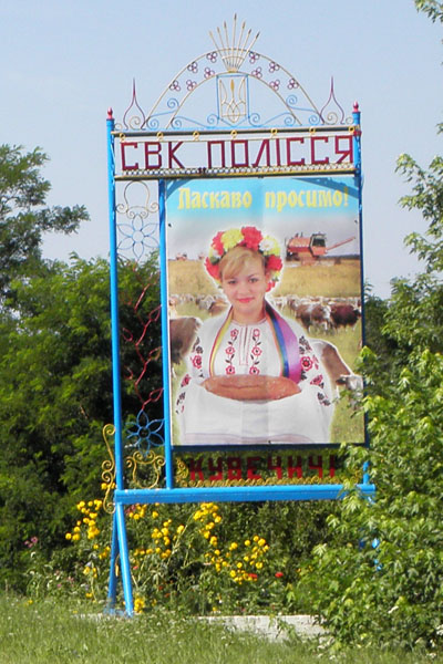 Kuw.jpg: Дороговказ при дорозі біля села Кувечичі Чернігівського району Чернігівської області